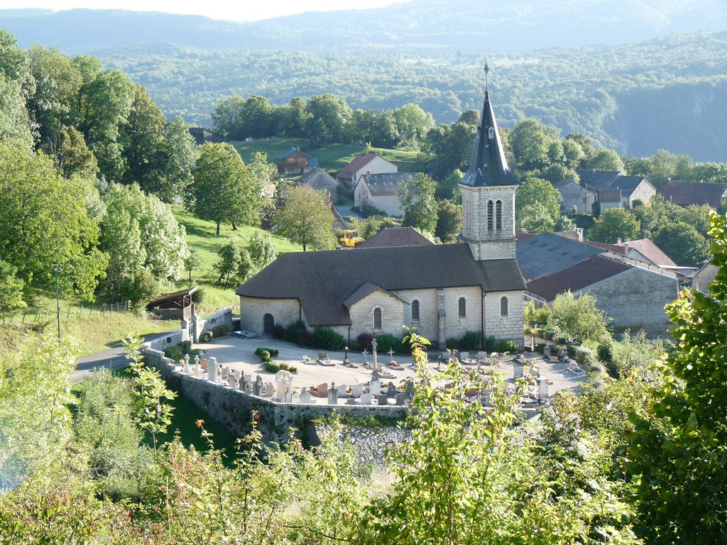 Prise du lacet qui arrive à Hostiaz ; Orientation Nord Sud